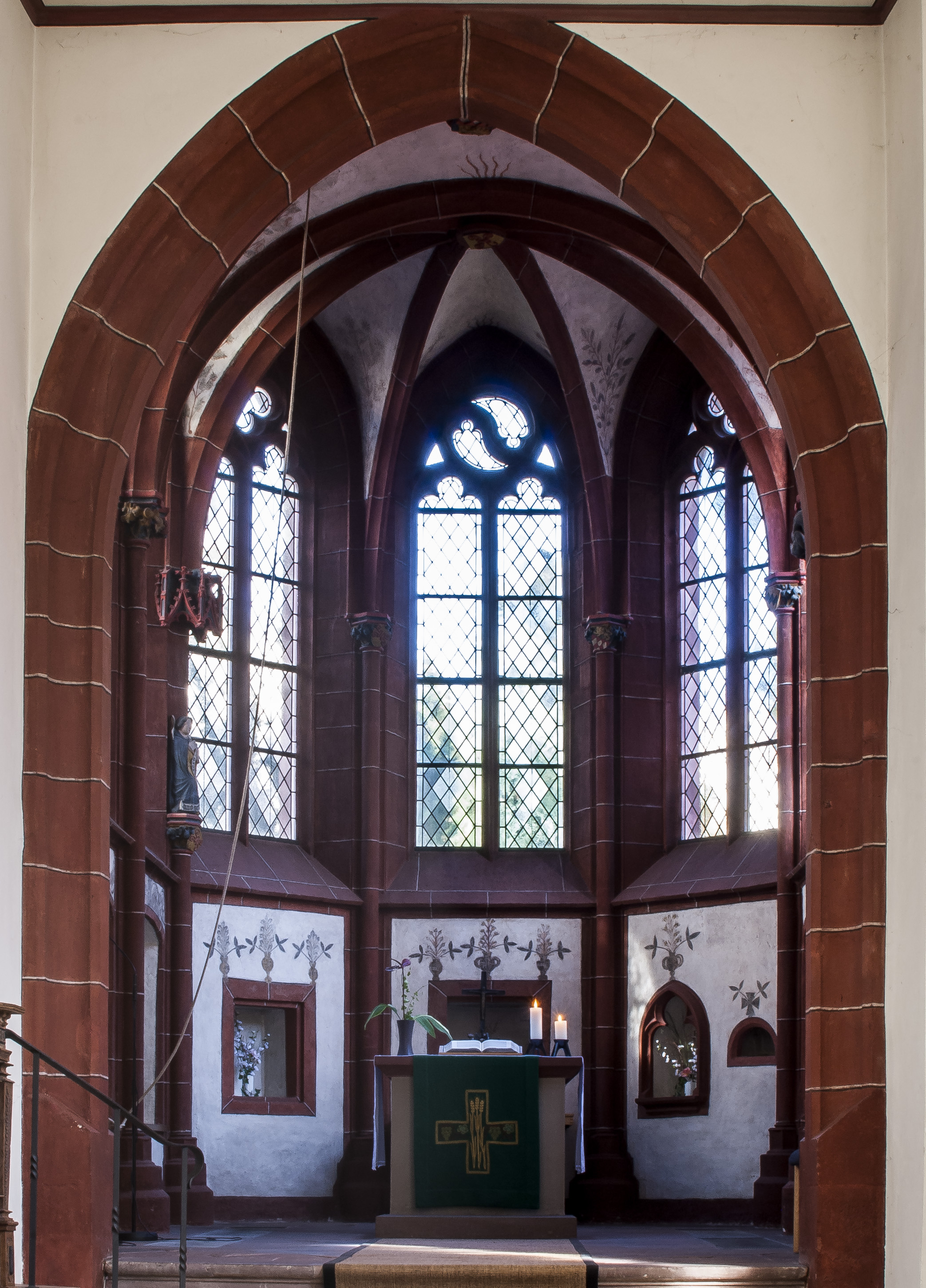 Chor der Hospitalkirche in Biedenkopf. Das ist auch der einzige, noch im Originalzustand, erhaltene Teil der Hospitalkirche aus dem Jahr 1419.